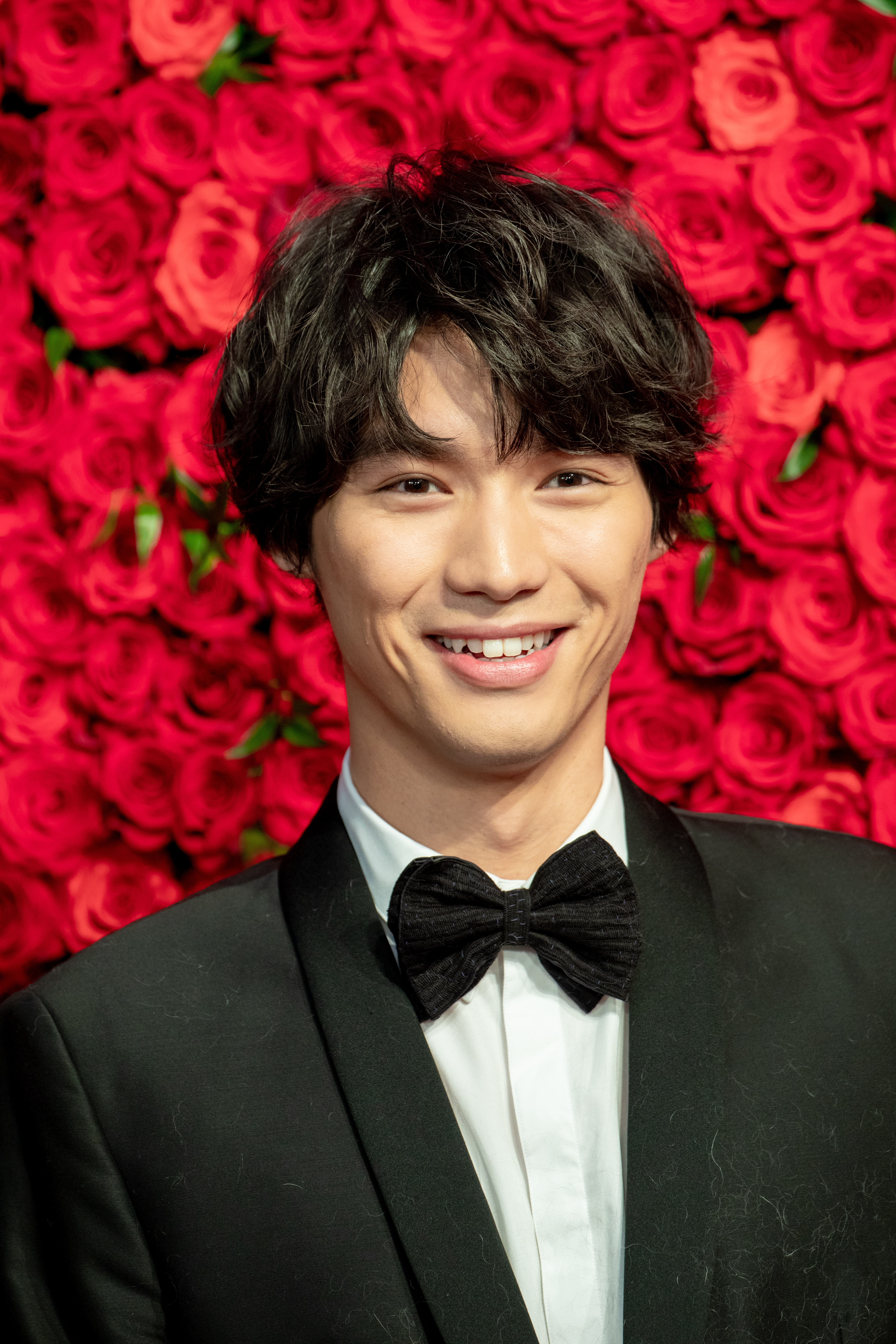 第30回 東京国際映画祭 オープニングセレモニー 福士蒼汰 (旅猫リポート)